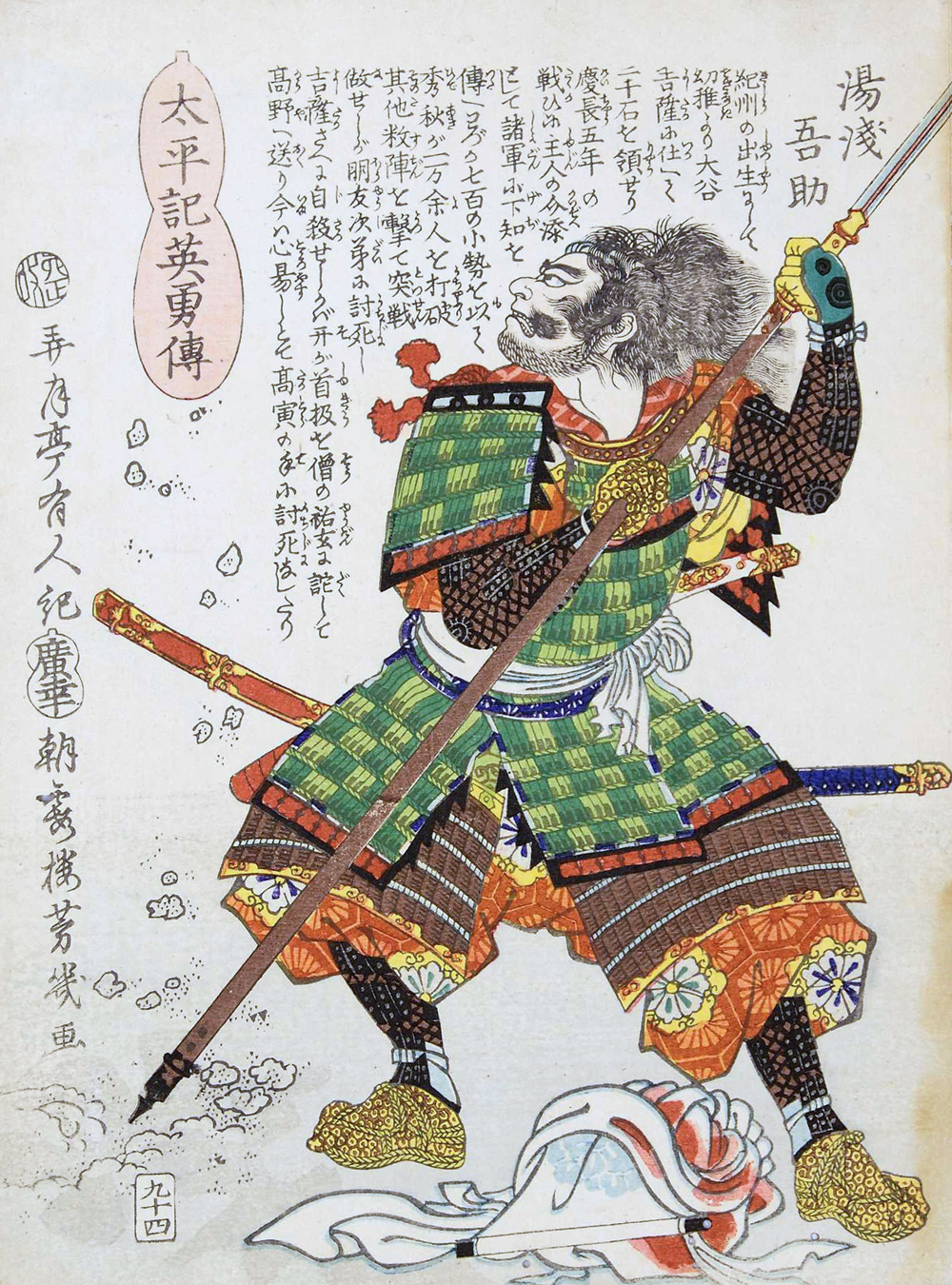 「太平記英勇伝九十四：湯浅吾助」